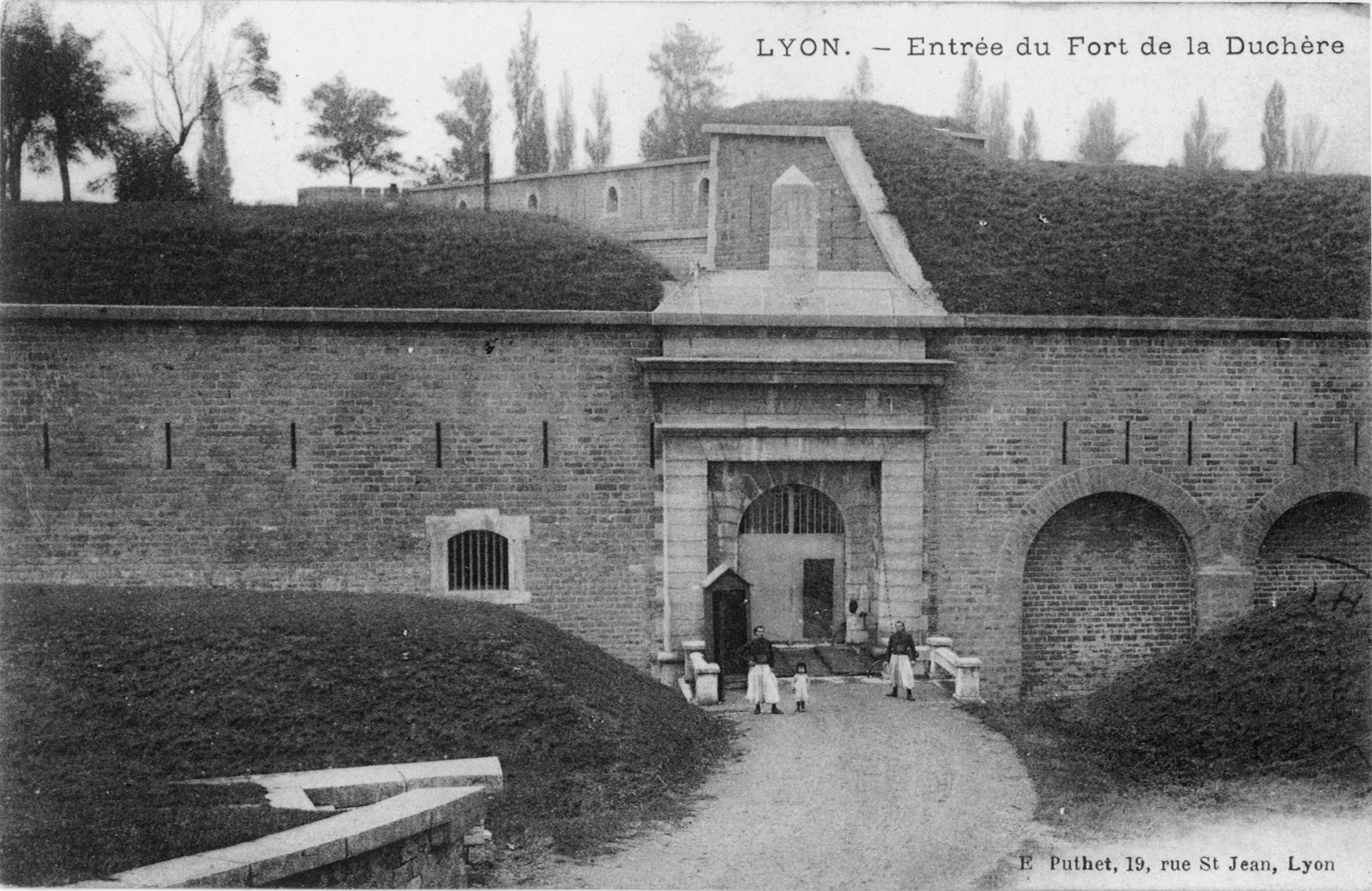 Entrée du fort de la Duchère.